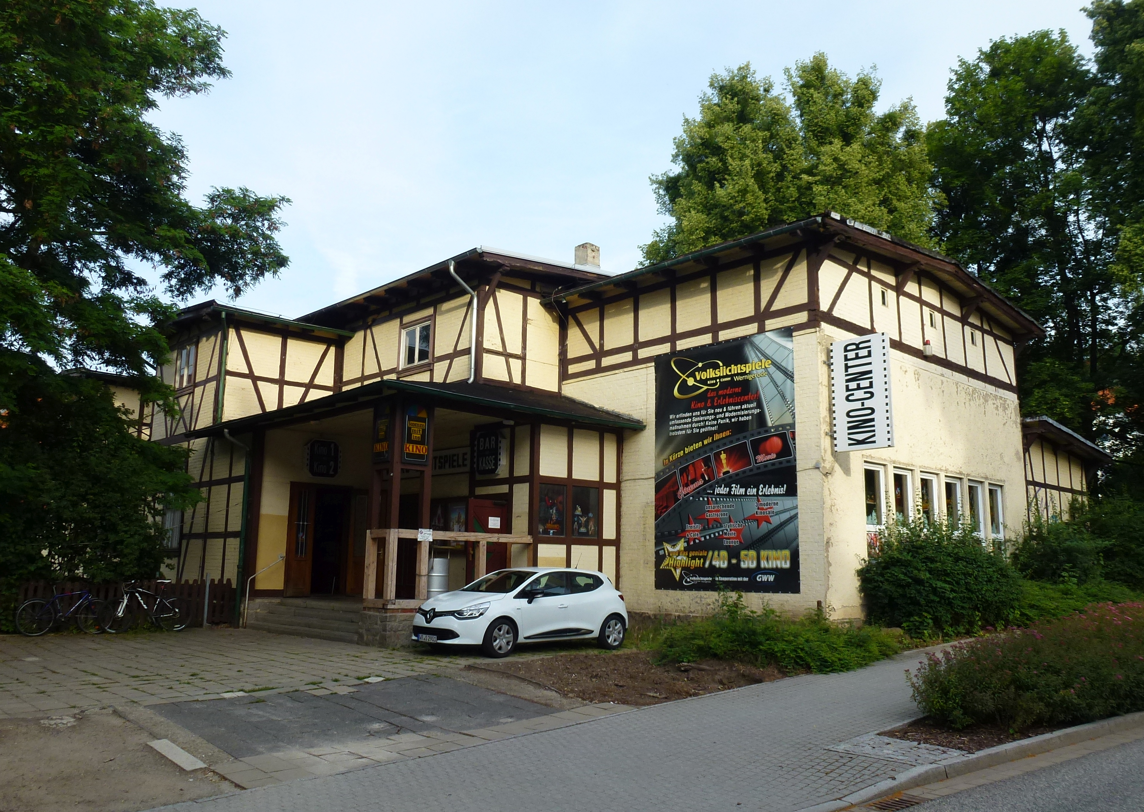 Volkslichtspiele Wernigerode, Salzbergstraße 1, seit 1918 im Saal des Alten Schützenhauses (An der Flutrenne 6), Ansicht des Eingangs